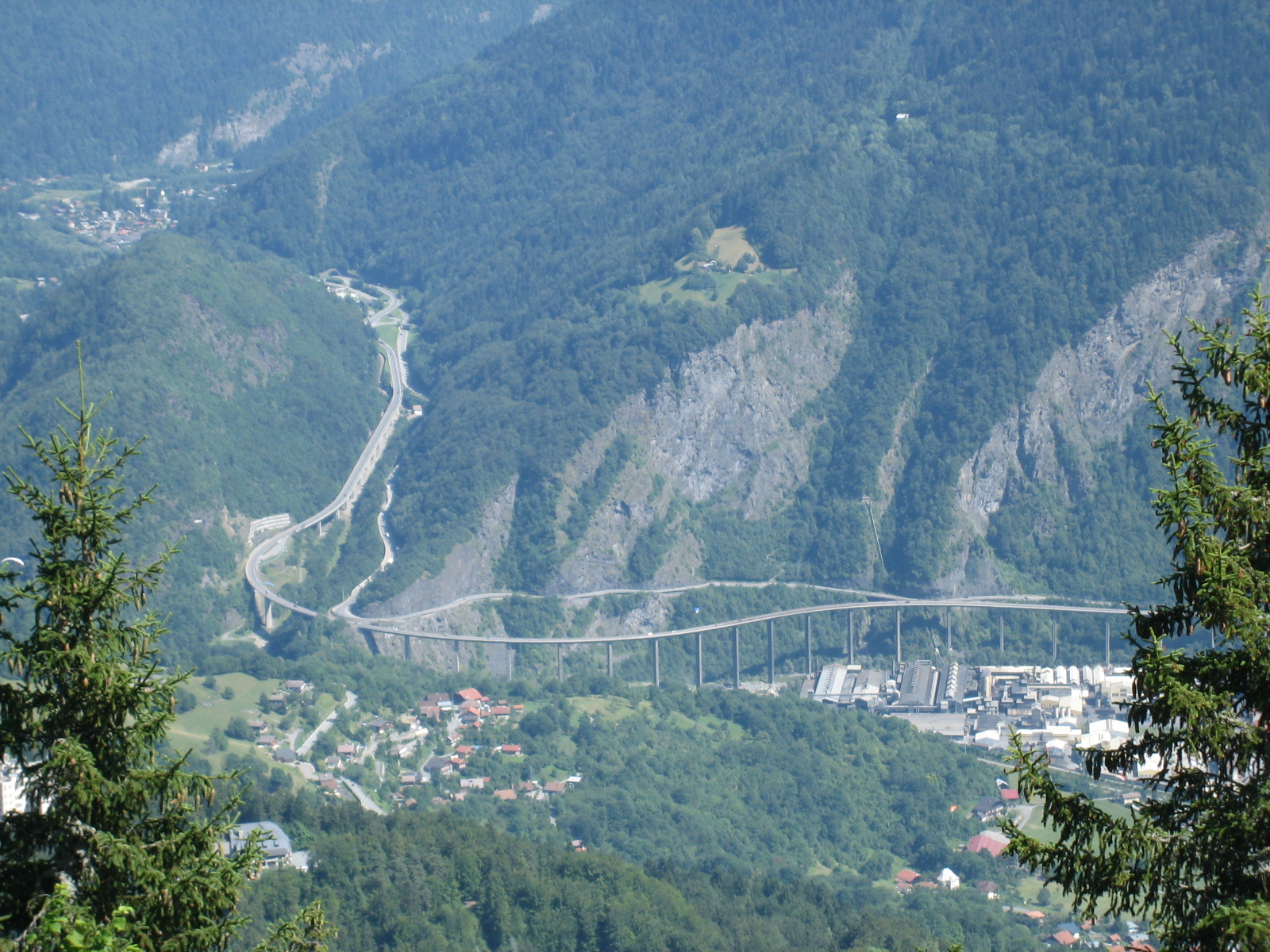 Le viaduc des Egratz en Haute-Savoie qui permet d'accéder à la vallée de Chamonix, en juillet 2009.